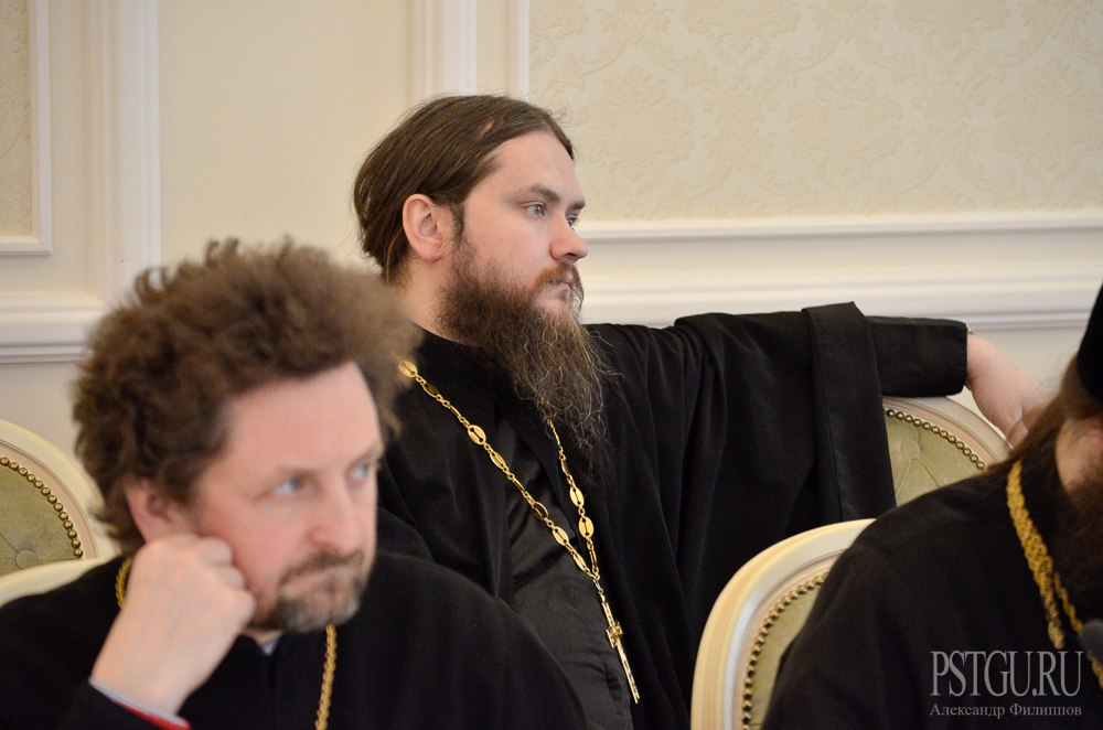 Научно-практическая конференция «Всеправославный собор мнения и ожидания». иеромонах Игнатий (Шестаков)